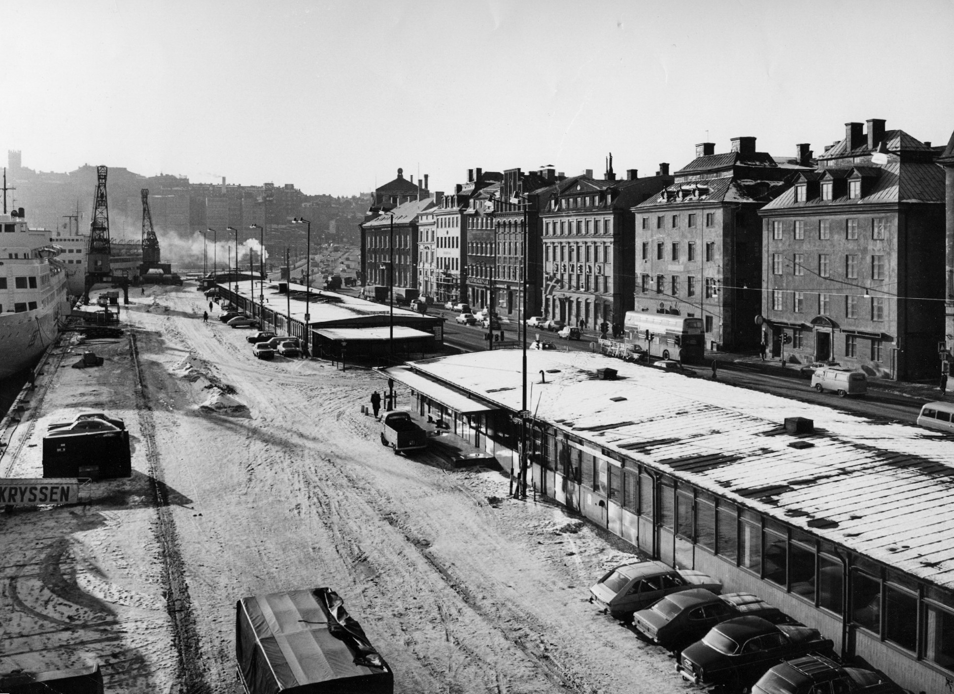 Skeppsbron i Stockholm, vy söderut. Till höger bl a Stockholms Rederi AB Sveas huvudkontor vid Skeppsbron 28.